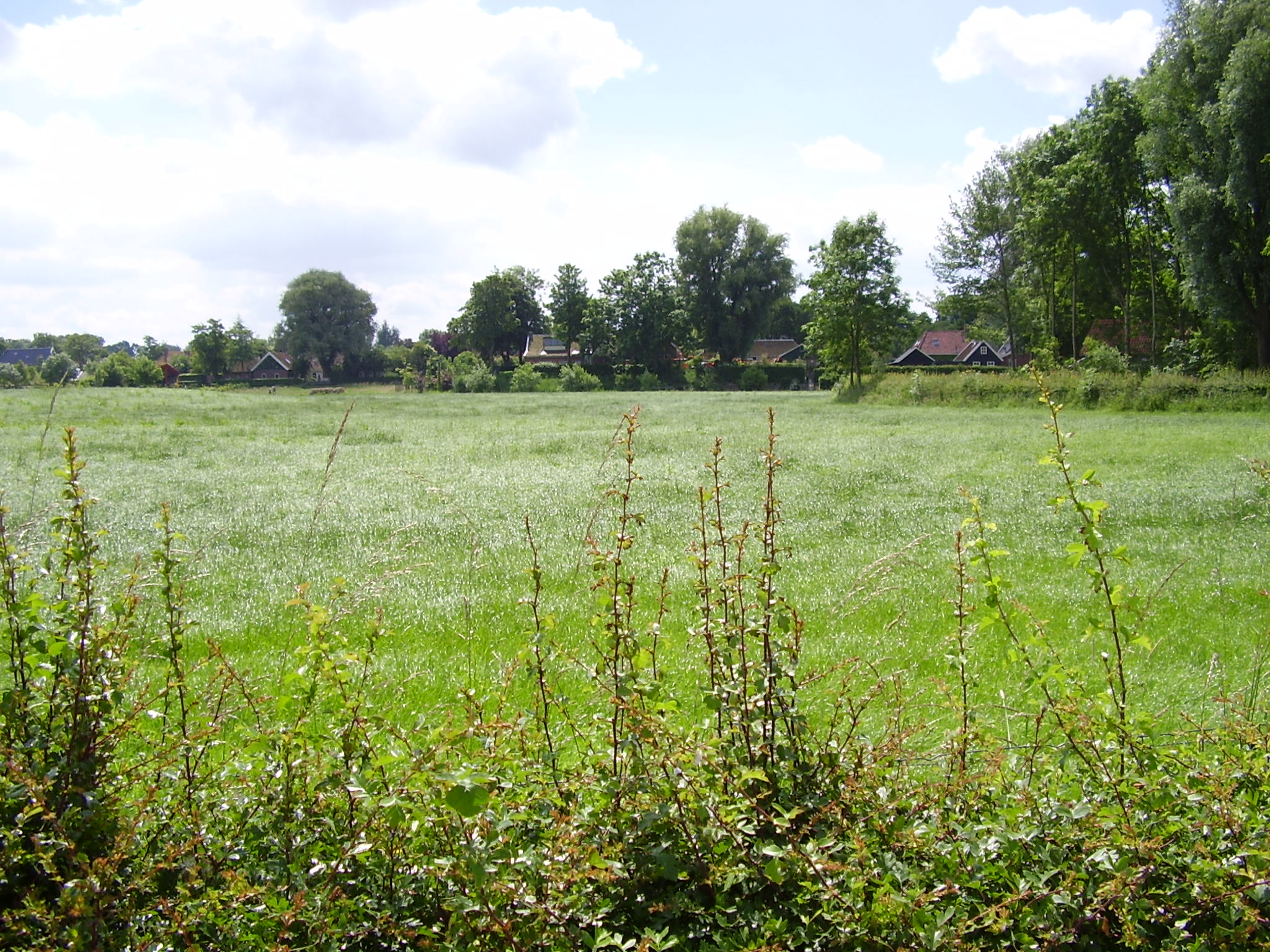 Zicht op de wierde